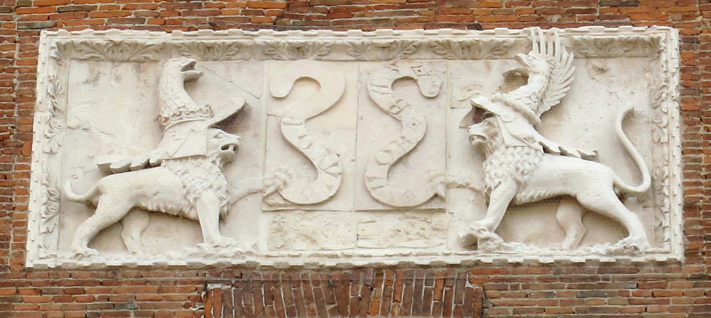 Castello Estense - MIBAC This is a photo of a monument which is part of cultural heritage of Italy.